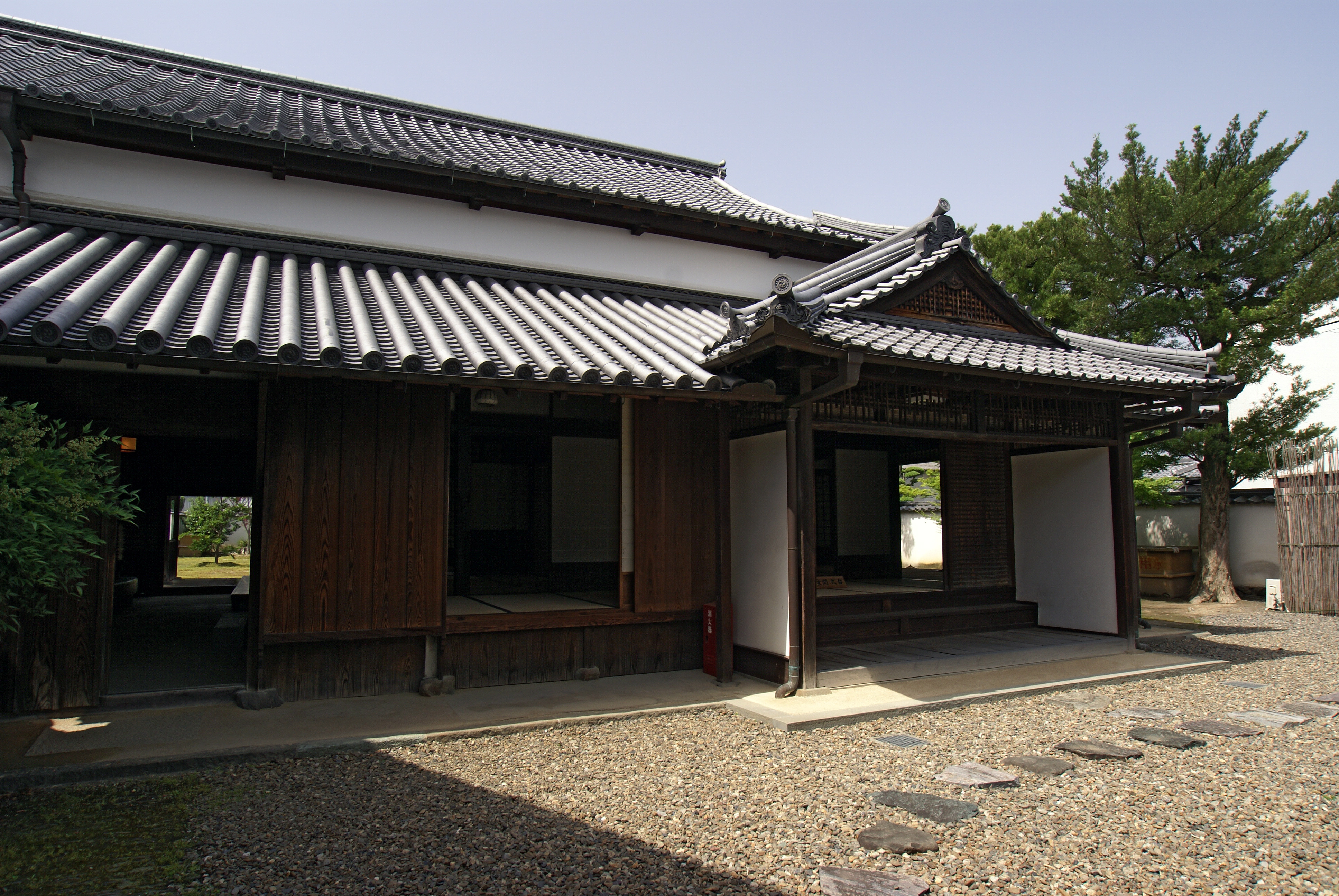 Old Nate-juku Honjin in Kinokawa, Wakayama prefecture, Japan